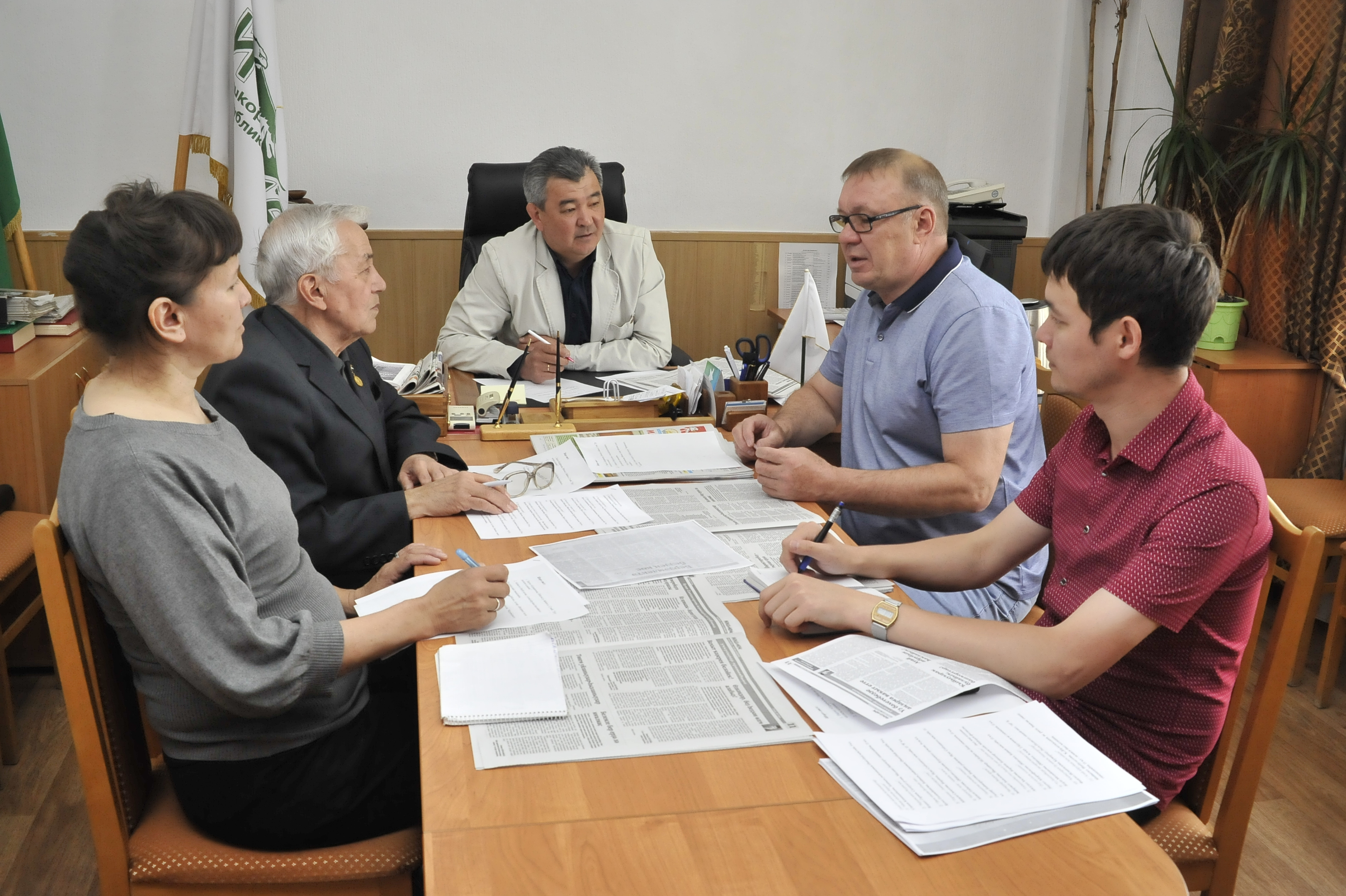 Заседание комиссии по присуждению премии имени Булата Султангареева, 2017 год